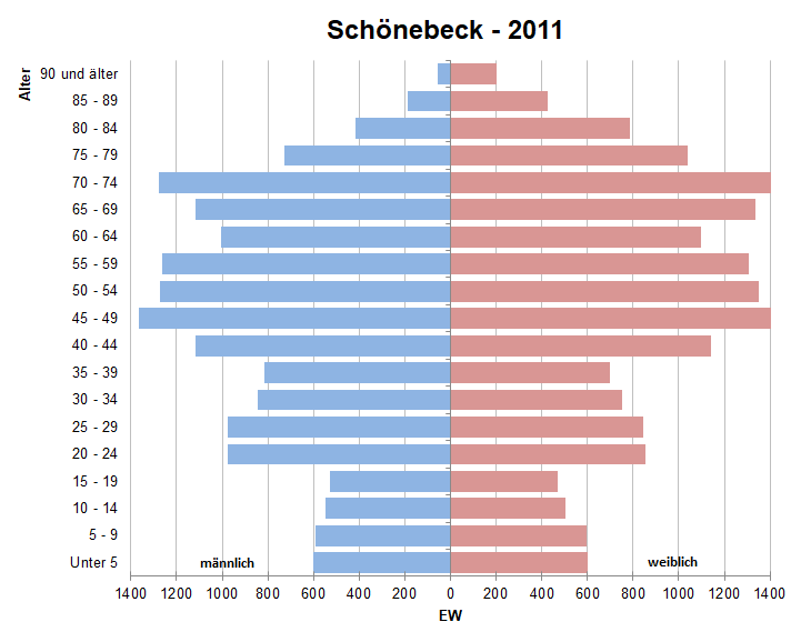 Bevölkerungspyramide der Stadt Schönebeck nach Zensus 2011.